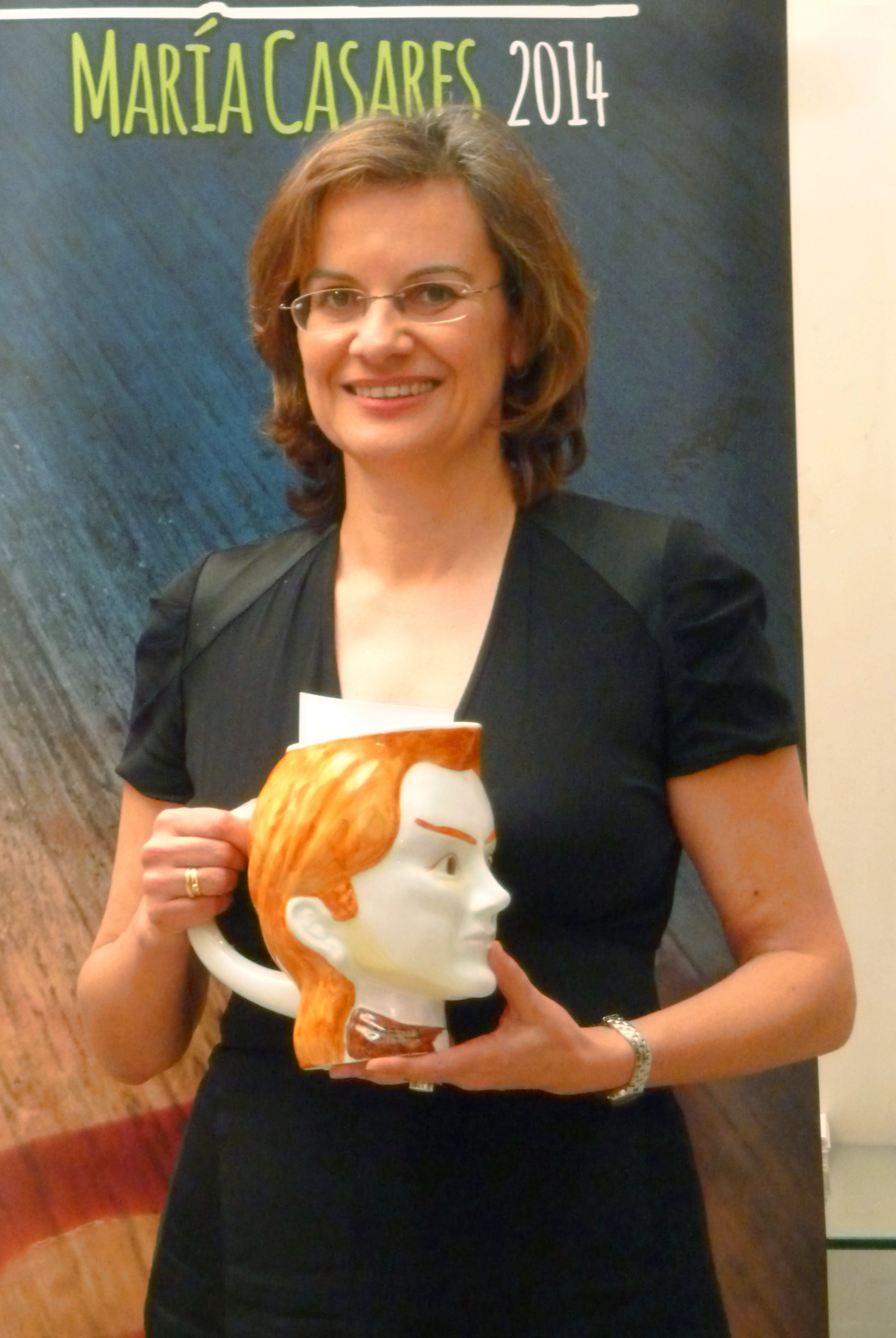 Cristina Domínguez na gala dos premios María Casares 2014.